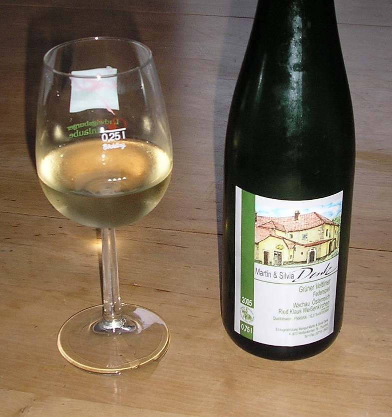 glass of wine, Grüner Veltliner, from Wachau, Austria